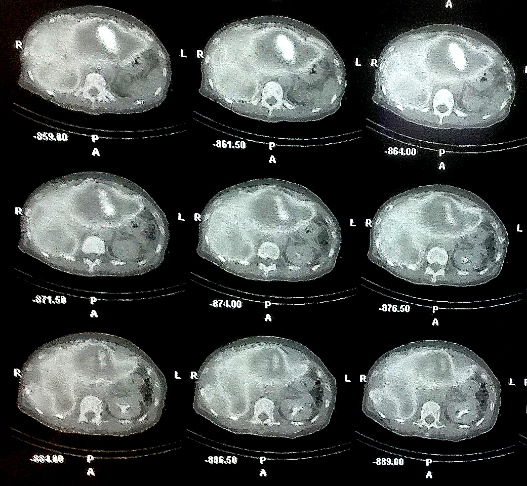 中文（台灣）: 釔90同位素模擬測試